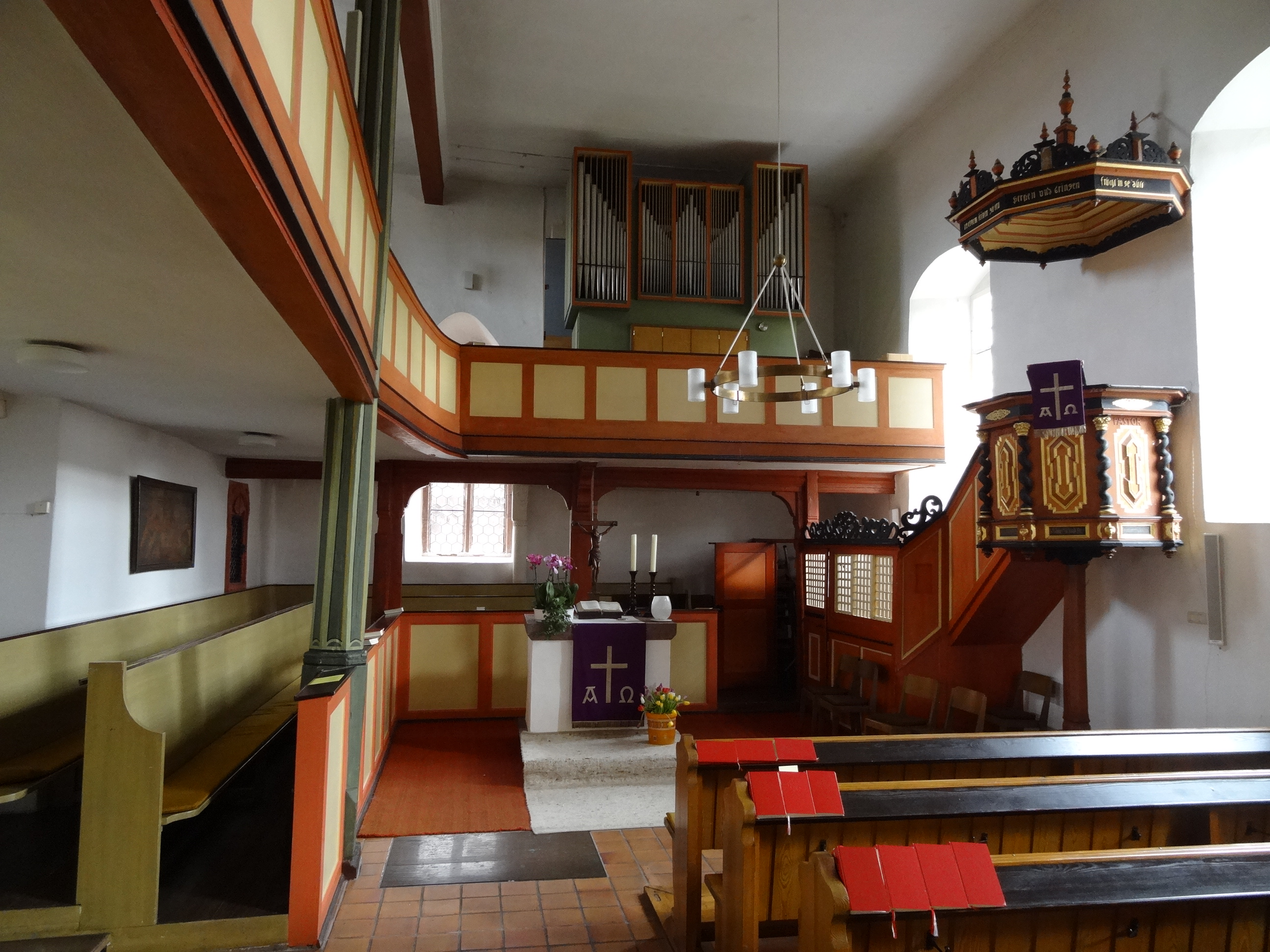 Evangelische Kirche (Ulfa)